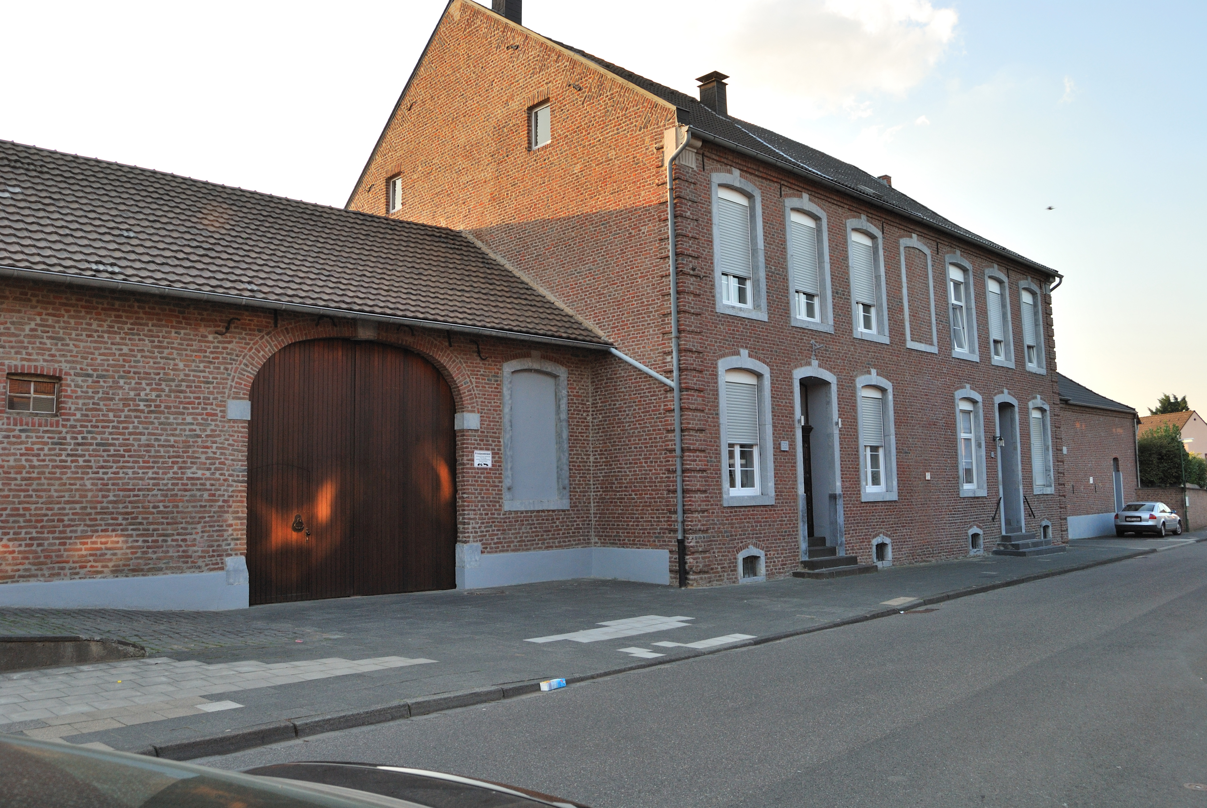 Fortunastraße 28/30; Denkmalnummer 164 This is a photograph of an architectural monument.